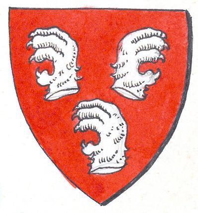 Lodede vana aadliperekonna vapp, lõvikäpad